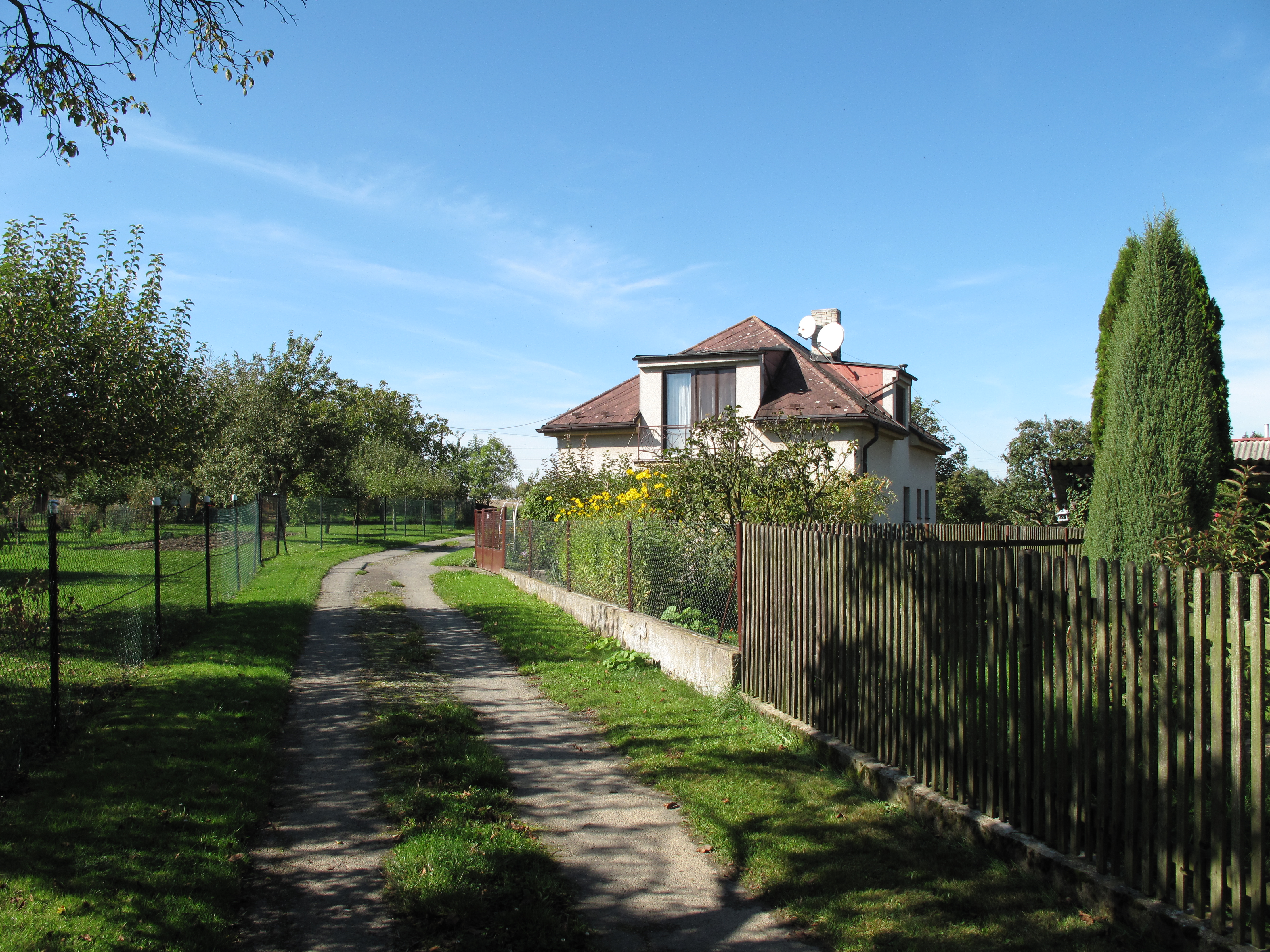 Plaňkový plot u cesty v Hroznicích. Okres Kutná Hora, Česká republika.